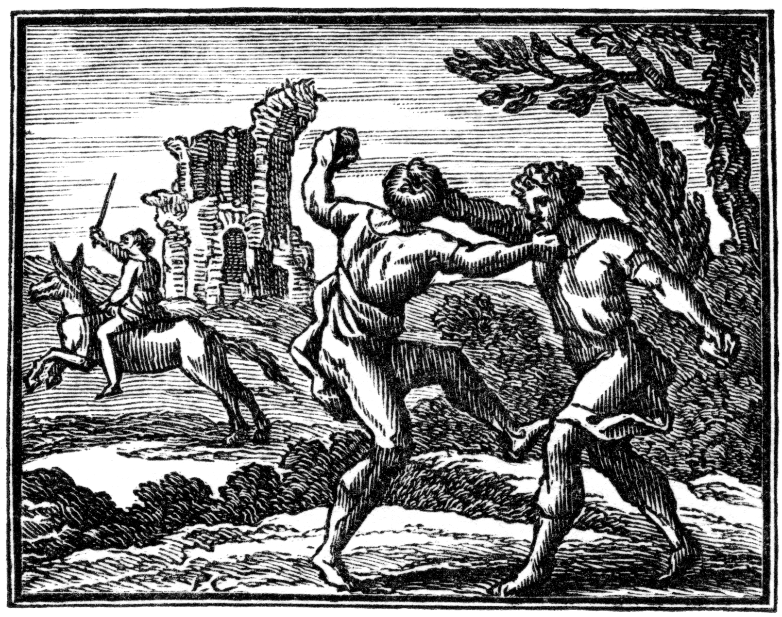 Illustrations pour les « Fables choisies mises en vers par M. de la Fontaine », Claude Barbin et Denys Thierry, Paris, 1668 (premier recueil) 1678-79 (deuxième recueil) 1694 (troisième recueil). Numérotation Charpentier (1705).